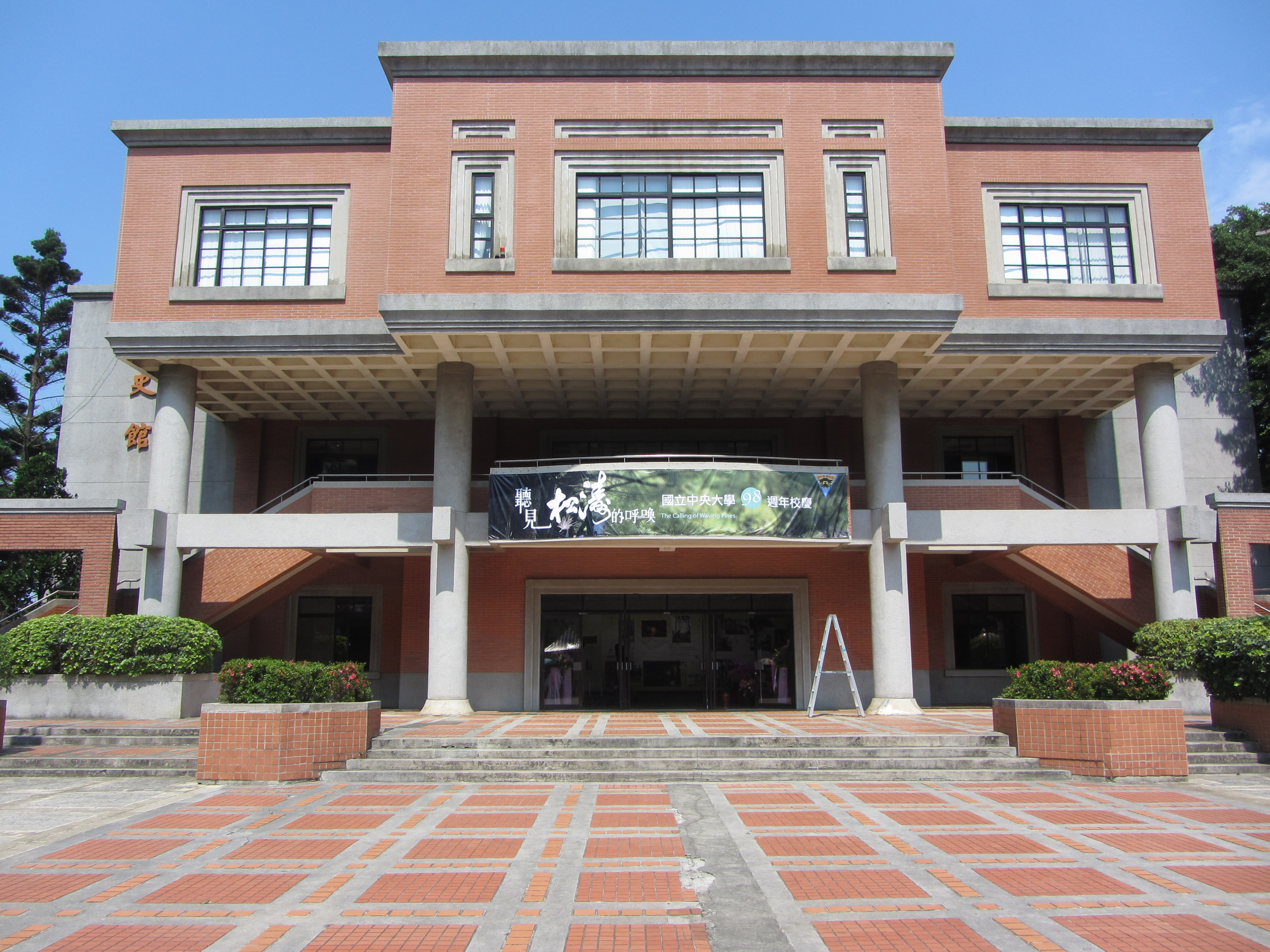 國立中央大學校史館